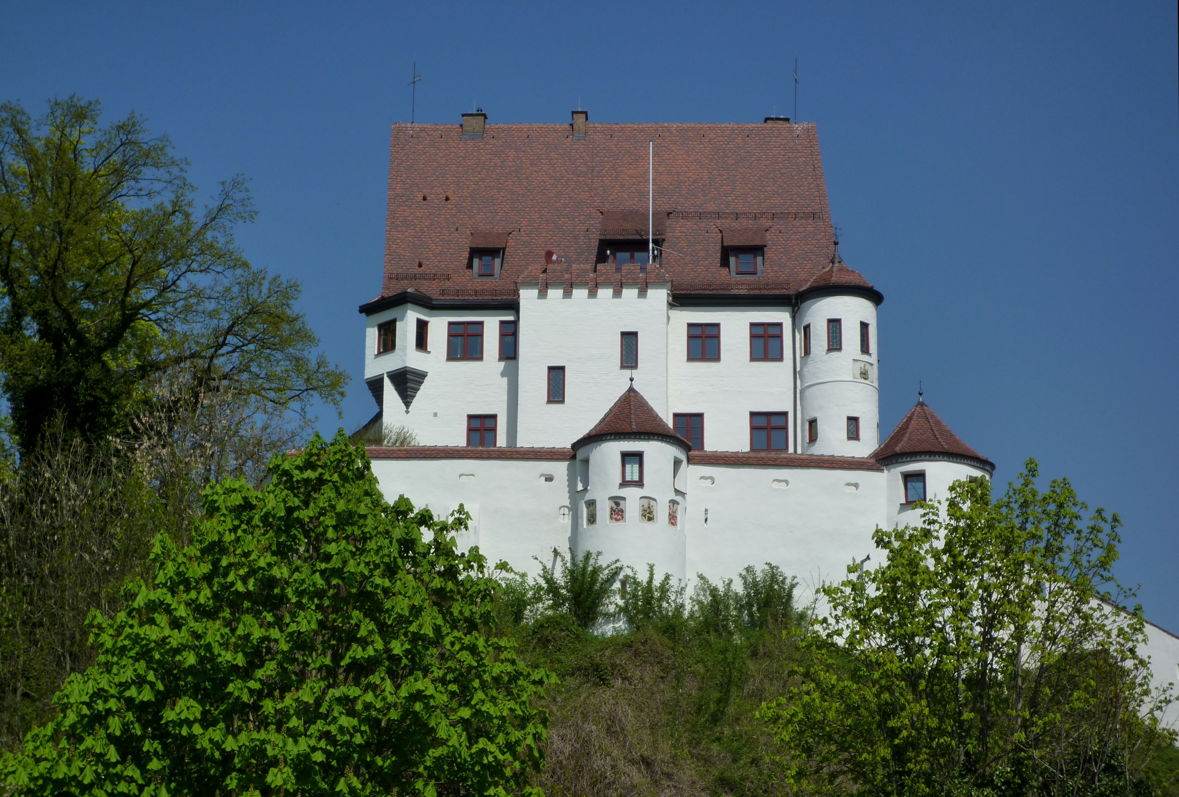 Leipheim - Schloss02